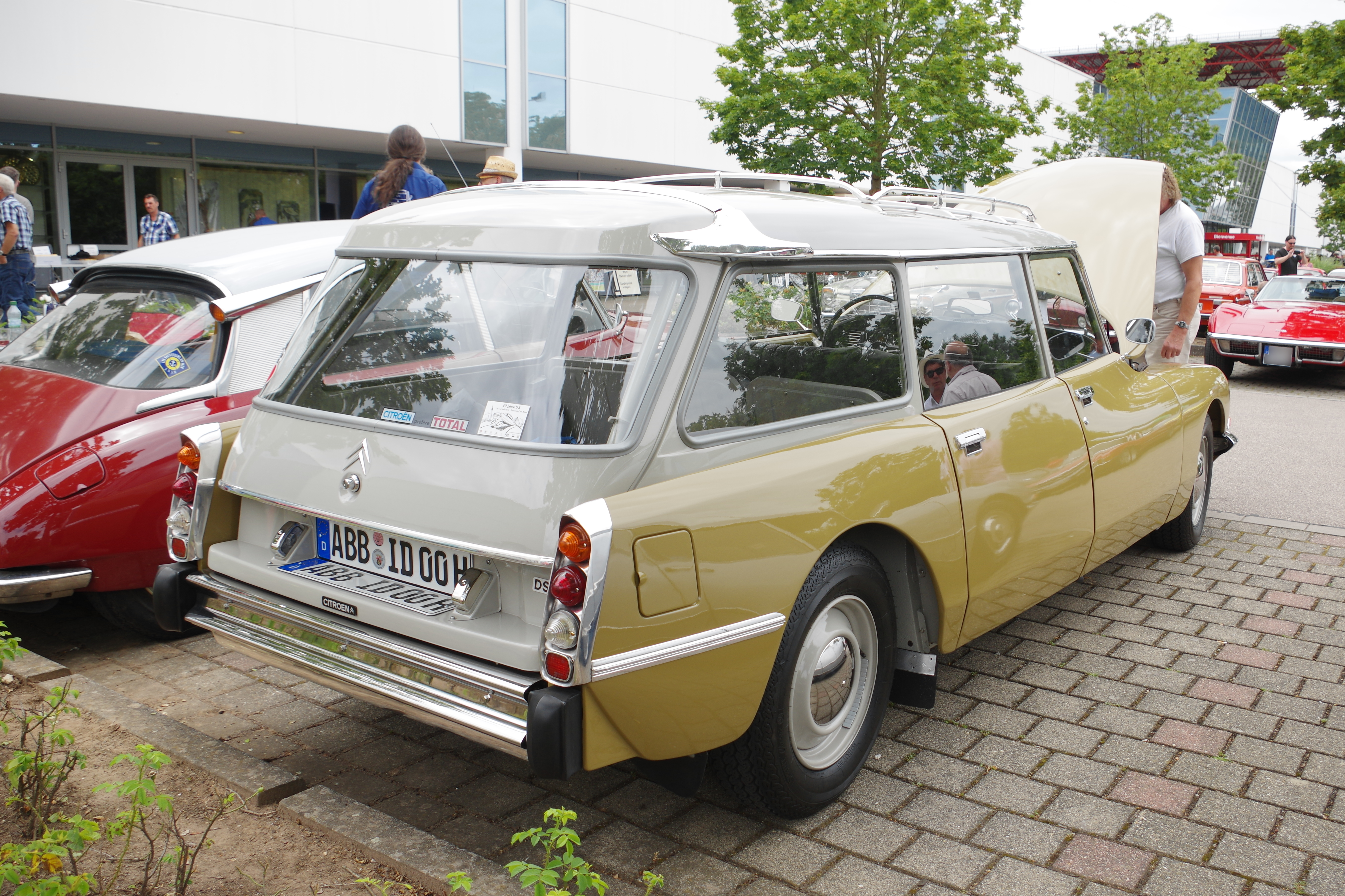 Citroën DS 20, 1971, 98 PS, 32. Internationales Oldtimer Treffen Konz 2016, Das Nummernschild ist verfälscht!